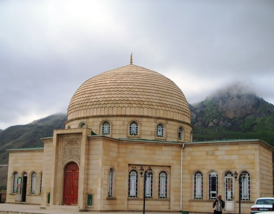 Пир Хыдыр Зында